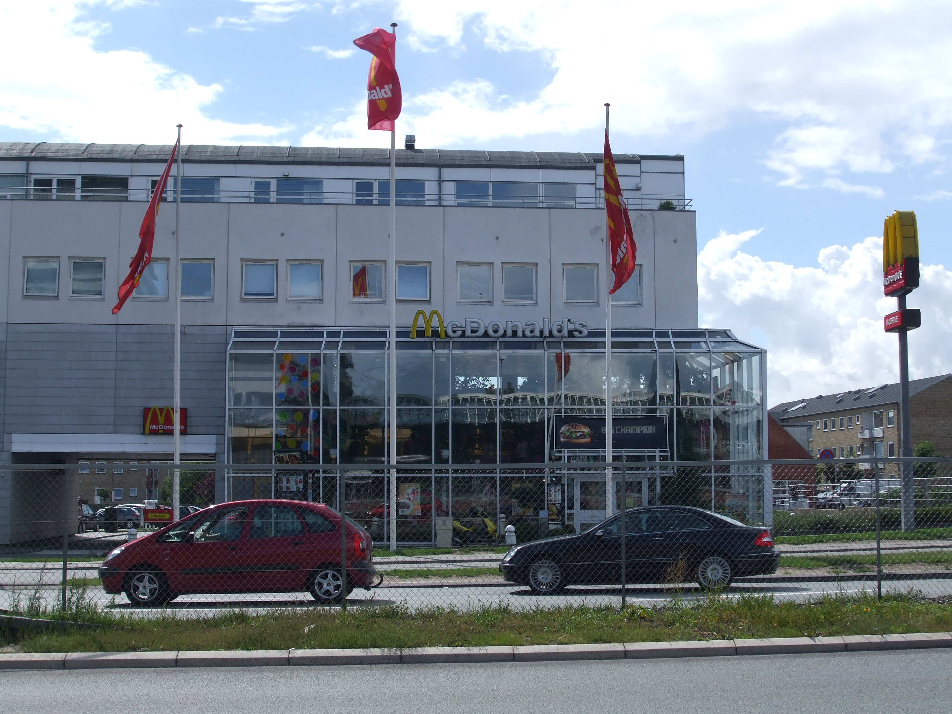 McDonald's i Viby ved Århus